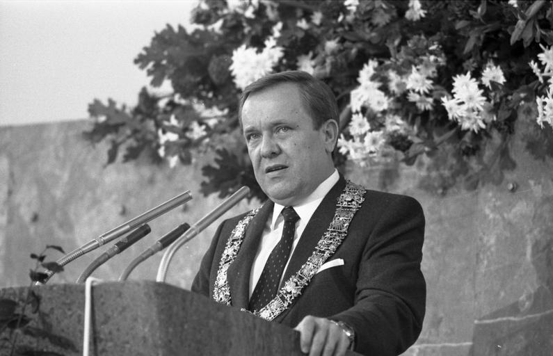 Verleihung des Friedenspreises des Deutschen Buchhandels für 1982 an den amerikanischen Diplomaten und Historiker George F. Kennan in der Frankfurter Paulkirche.